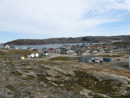 Petit village du Nunavik, Ivujivik le village le plus au nord du Québec.